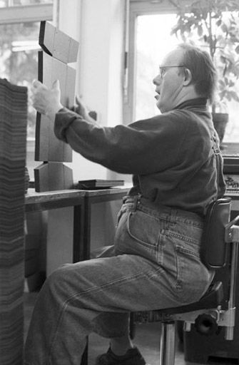 Walter während der Arbeit in einer Werkstatt. Walter Kistler überlebte die Nazizeit, da er von seinen Eltern versteckt wurde. Walter, 53 (Down-Syndrom). Erschienen in: ZEITmagazin, Nr. 37, 6. September 1996, S. 8-15